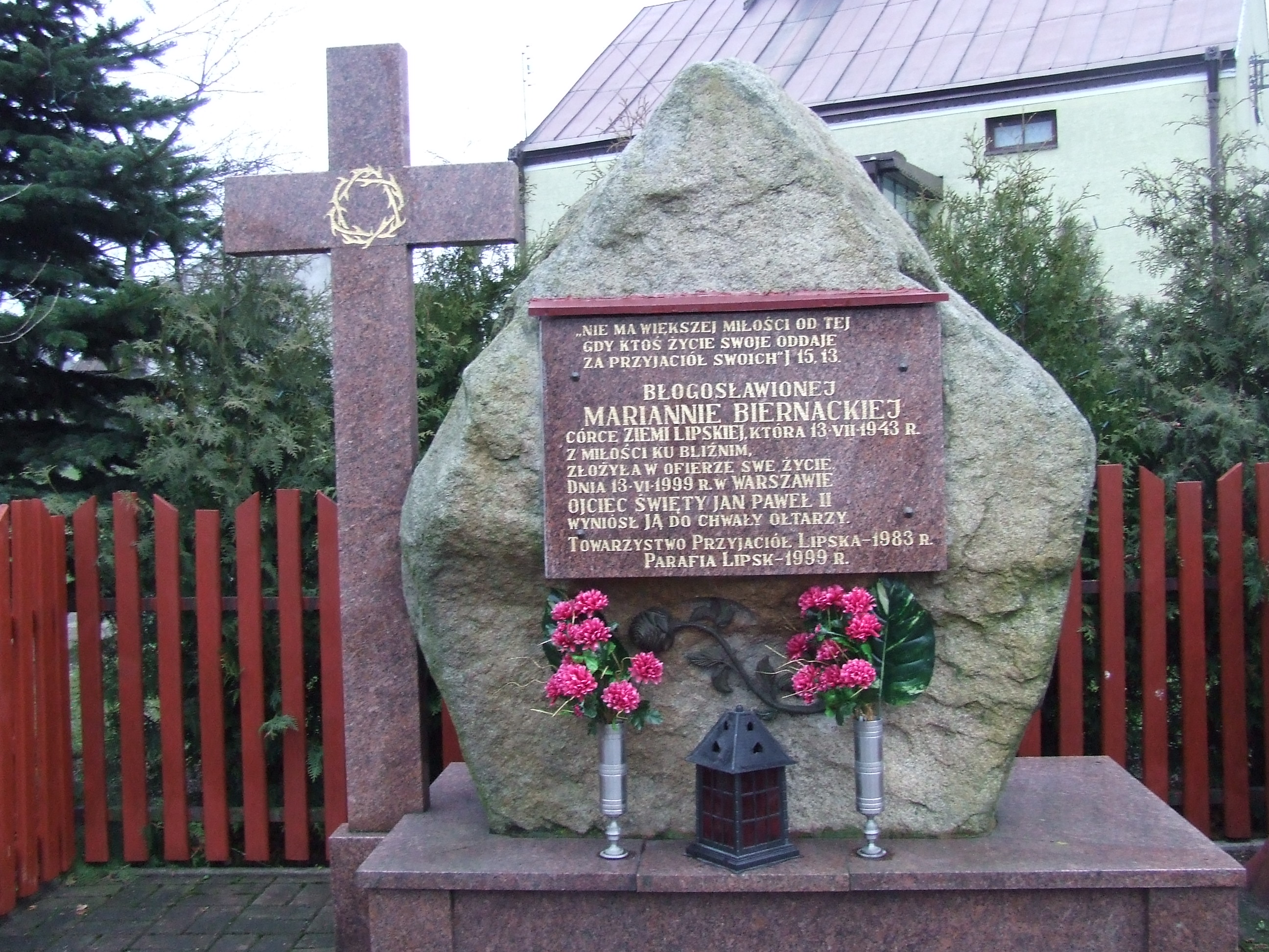 Monument poświęcony błogosławionej Mariannie Biernackiej / Blessed Marianna Biernacka monument